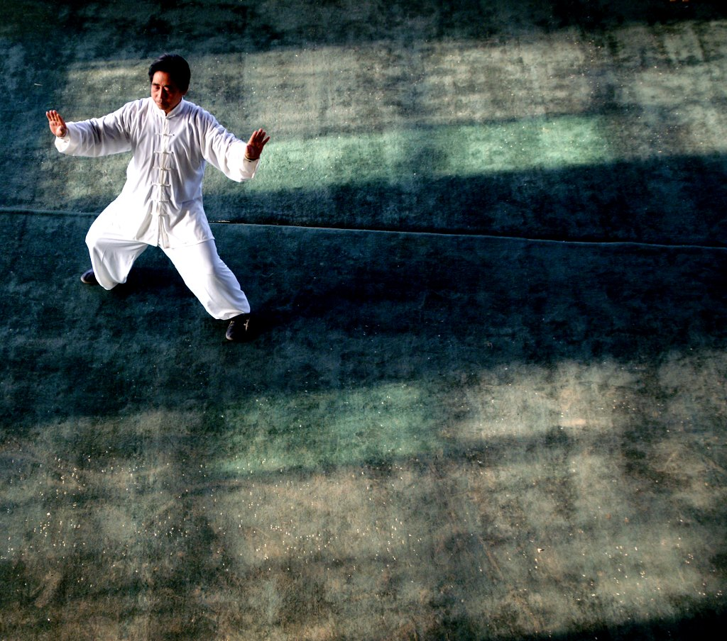 太极拳